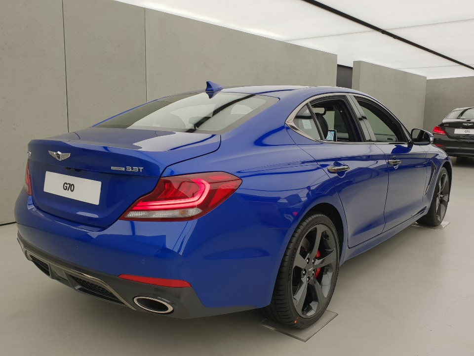 제네시스 G70 후측면